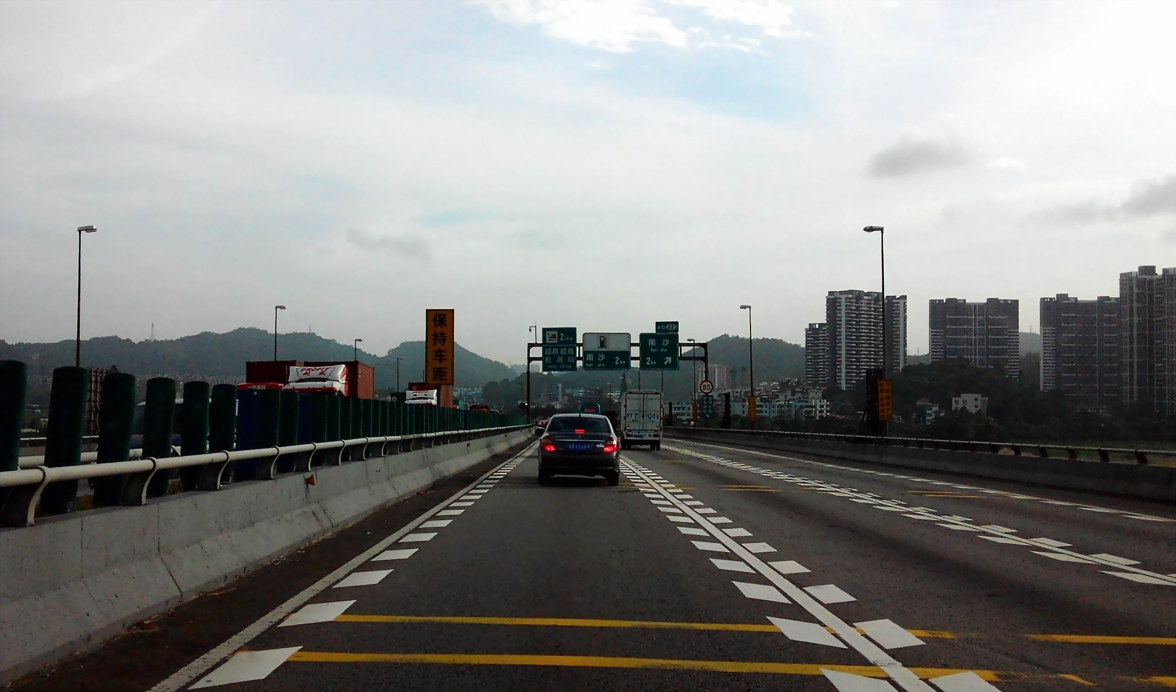 中国高速G9411 42出口 佛山方向